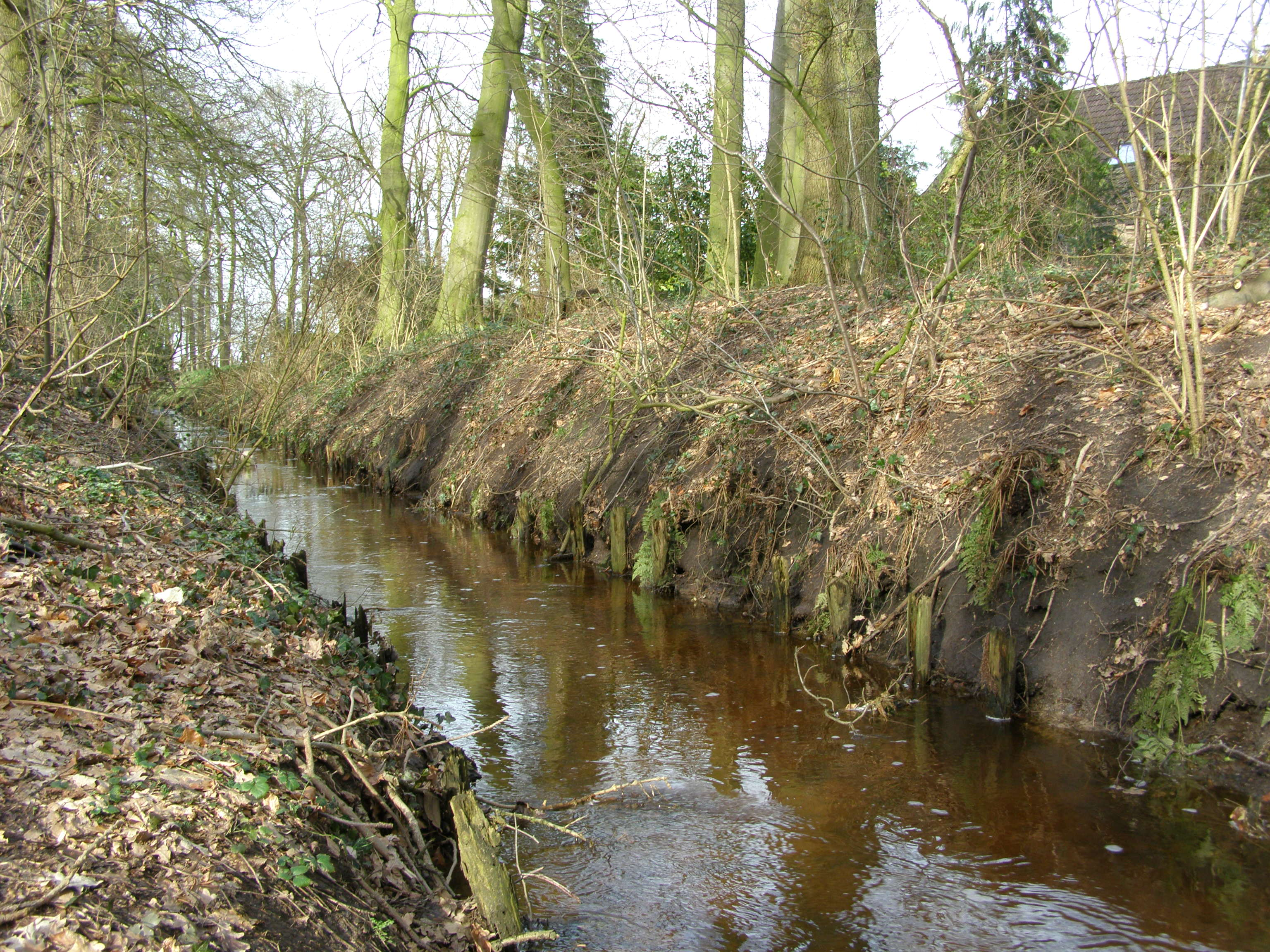 eigen werk. De Broekheurnerbeek is een beek in de omgeving van Enschede in de Nederlandse provincie Overijssel.